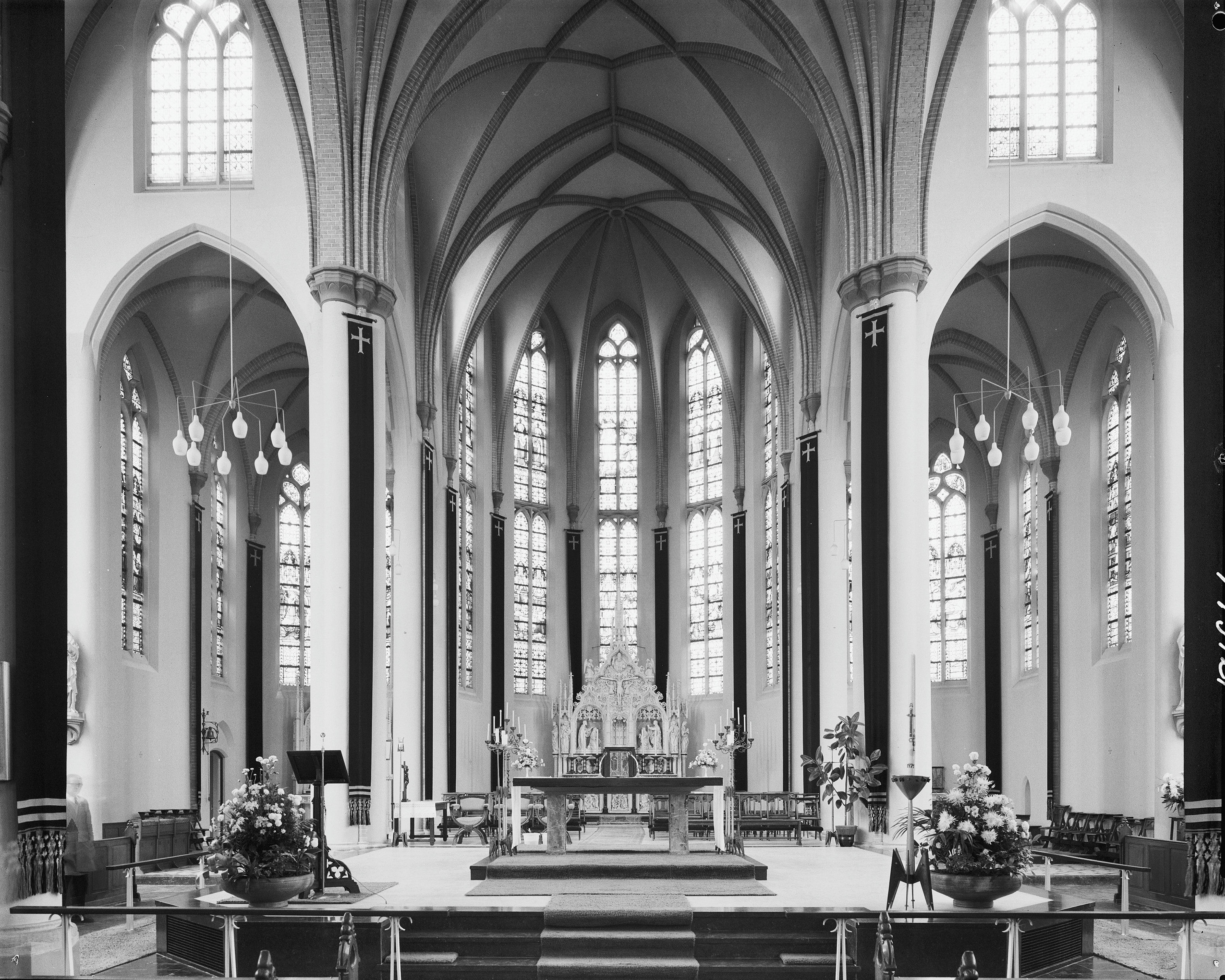 R.K.Kerk St.Antoniuskerk: interieur koor